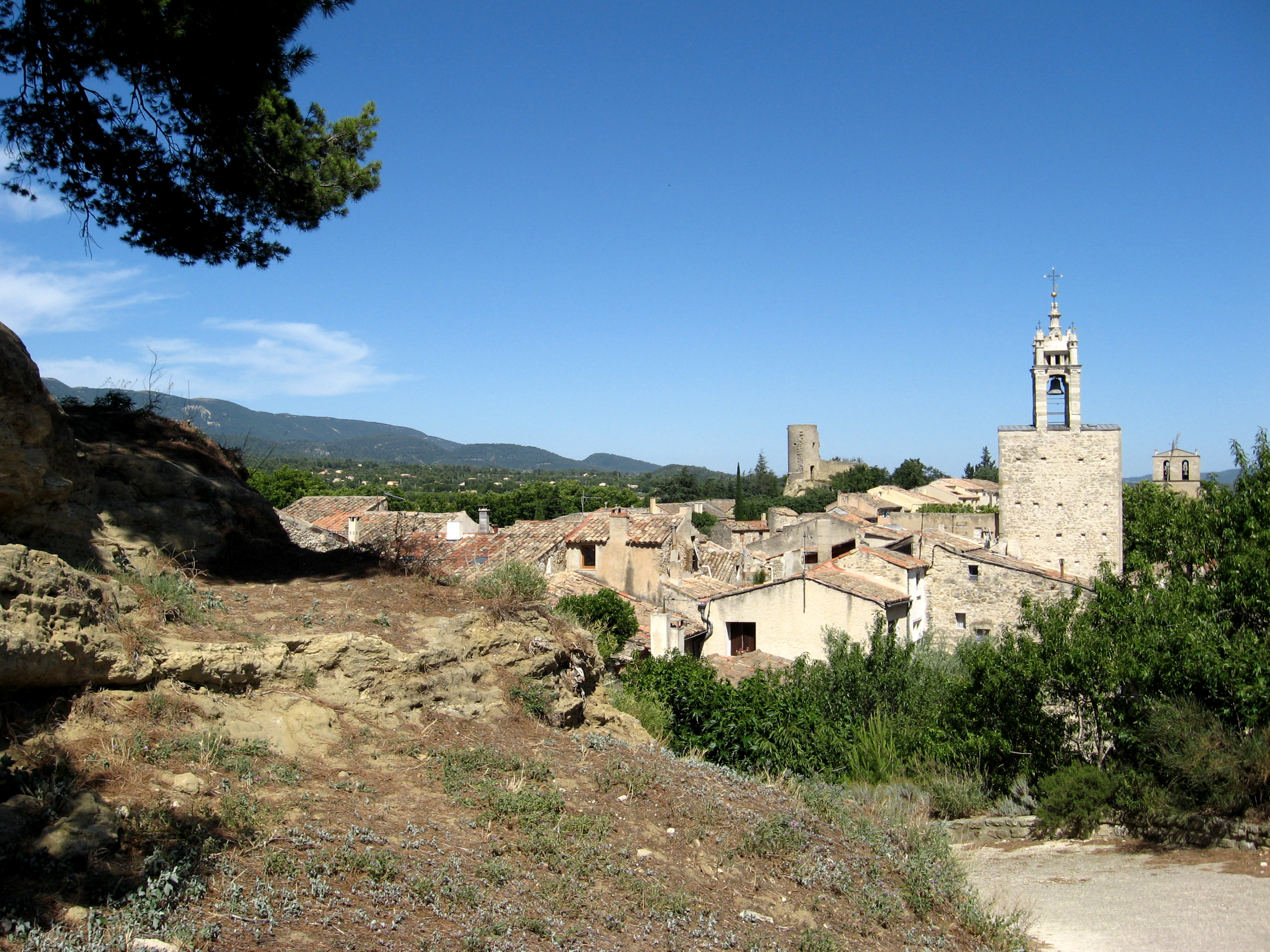 Panorama du village de Cucuron (Vaucluse, France).